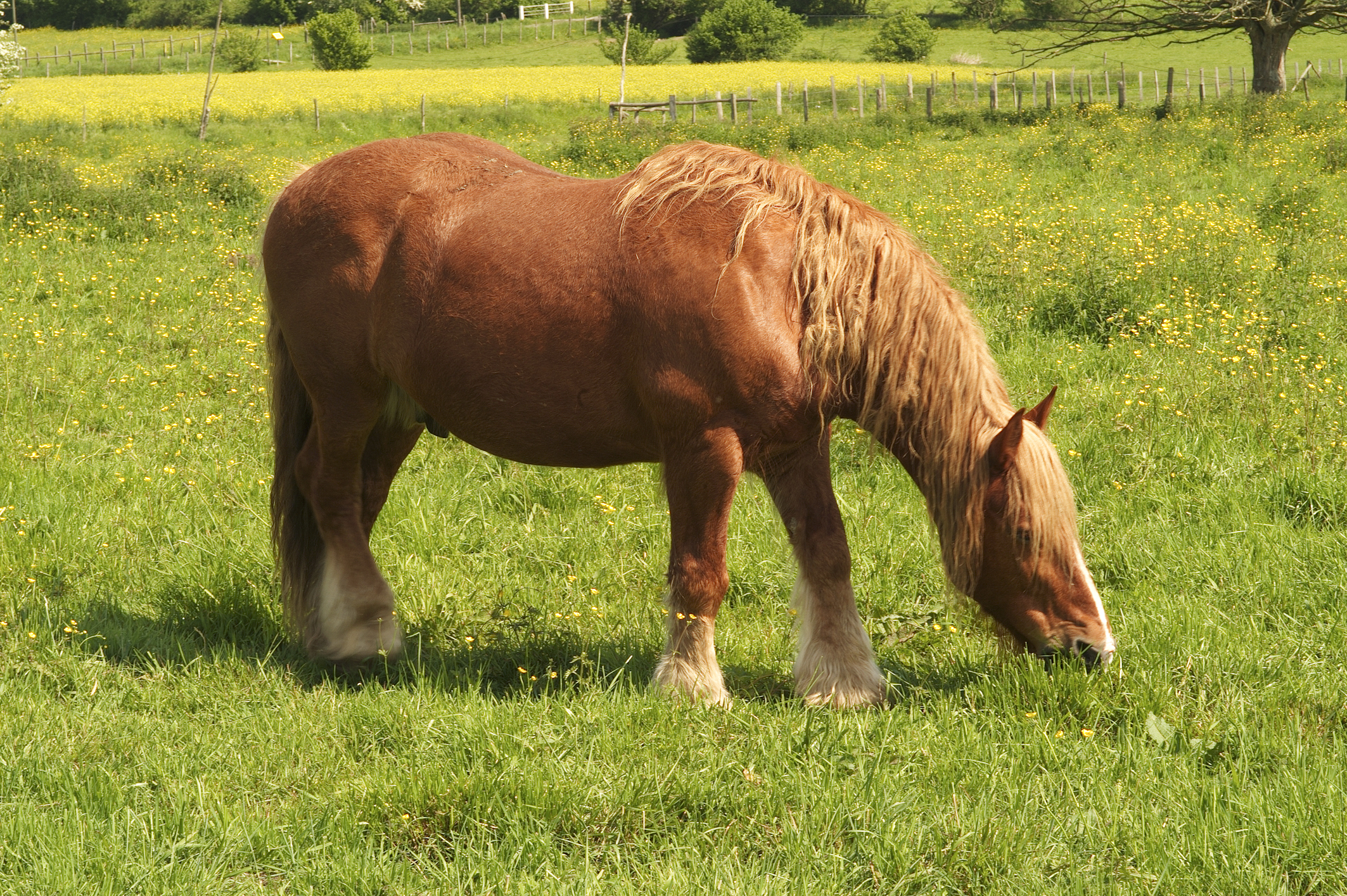 INRA, JEan Weber